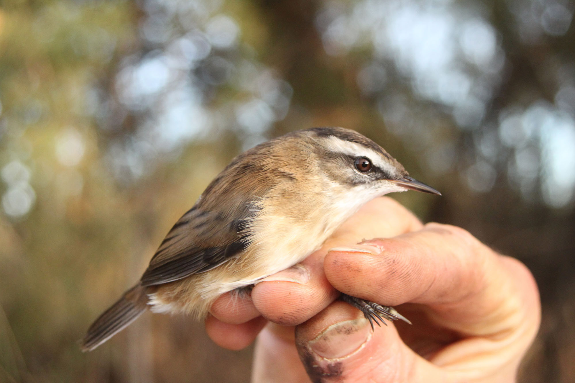 Lusciniole à moustaches photographié sur le camp de baguage de Saint-Marcel à Mauguio (France, département de l'Hérault)